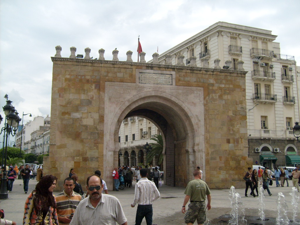 Vue de la place de la Victoire et de la porte Bab El Bhar à Tunis